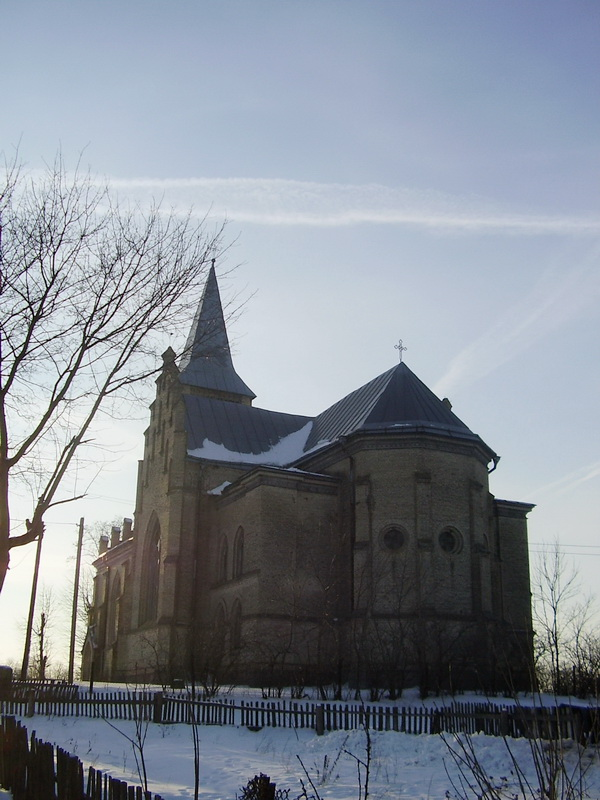 Міжэрычы. Касцёл Звеставання Найсвяцейшай Дзвевы Марыі